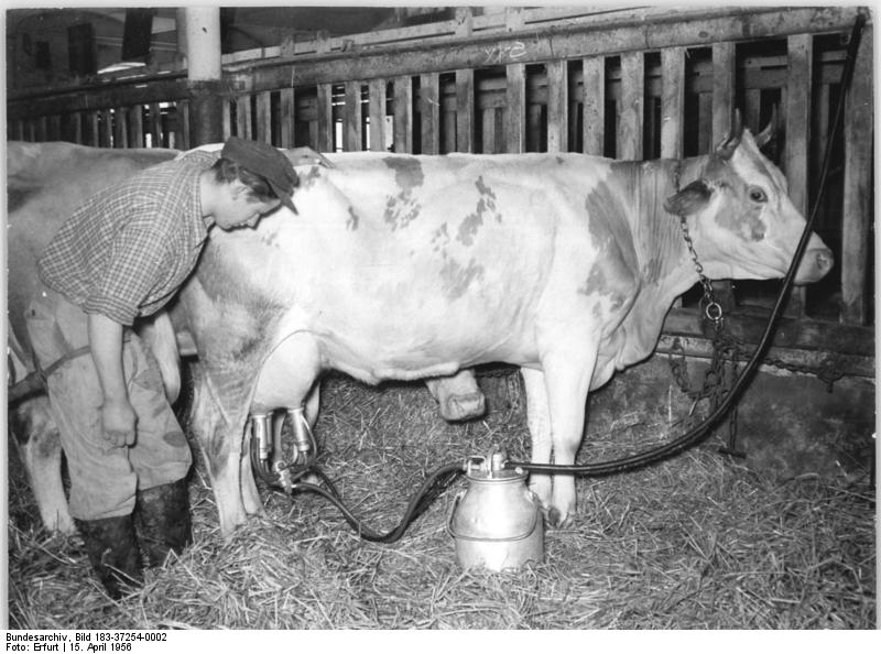 Schöndorf, Bauer beim Melken Zentralbild Erfurt 15.4.56 Wehag Melkergehilfe erzielt hohe Michleistung bei seinen Kühen. Das Volksgut Schöndorf, das im Herbst 1955 als bester Saatzuchtbetrieb unserer Republik mit der Wanderfahne des Ministeriums für Land- und Forstwirtschaft ausgezeichnet wurde, besteht aus fünf Brigadenbetrieben. In der Erdbrigade "Denstedt" wird der 19jährige Melkergehilfe und dreifache Bestarbeiter Rolf Hoffmann, für seine ausgezeichnete Arbeit am 1. Mai als Aktivist ausgezeichnet. Der junge Melkergehilfe hat 1-2 Jahr lang den Melkermeister des Gutes vertreten und konnte bei den 66 (sechs sechs) von ihm betreuten Kühen einen Stalldurchschnitt im Jahre 1955 von 4.000 (vier null null null) Liter Milch pro Kuh bei einem Fettgehalt von 3, 5 (drei Komma fünf) Prozent erreichen. Durch besondere individuelle Pflege und Fütterung gelang es ihm bei der neunjährigen Kuh "Renate" 1955 eine Jahresmilchleistung von 8.000 (acht null null null) Litern bei 3, 9 (drei Komma neun) Prozent Fettgehalt zu erzielen. Der Melkergehilfe Rolf Hoffmann will diese Prachtkuh 1956 auf eine Milchleistung von 9.000 (neun null null null) Liter bringen. UBz: Der Melkergehilfe Rolf Hoffmann mit seiner besten Kuh "Renate", die 1955 eine Milchleistung von 8.000 Litern hatte. Die Kuh wird mit einer sowjetischen Melkmaschine gemolken.